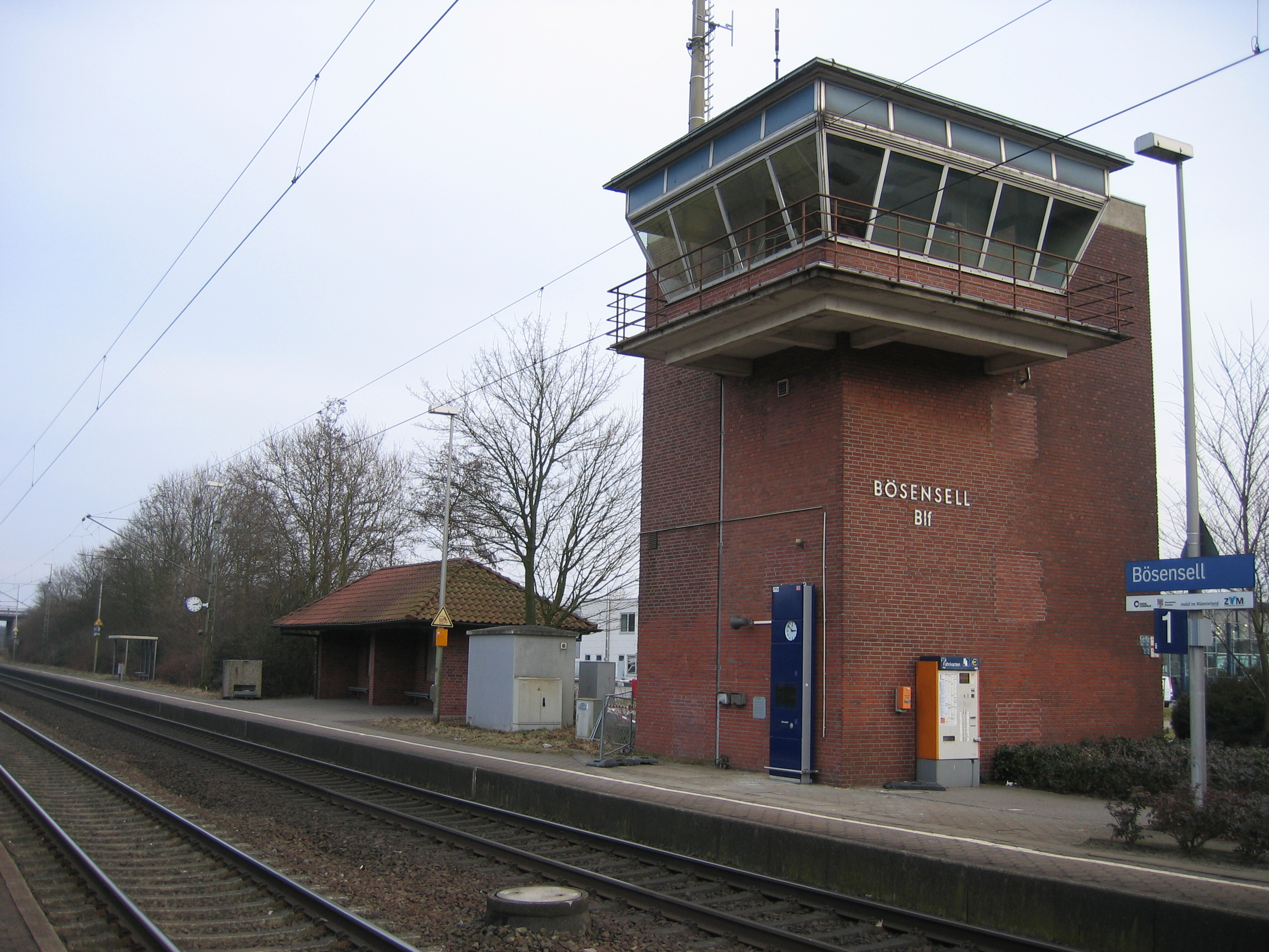 Bahnhof Bösensell im Münsterland